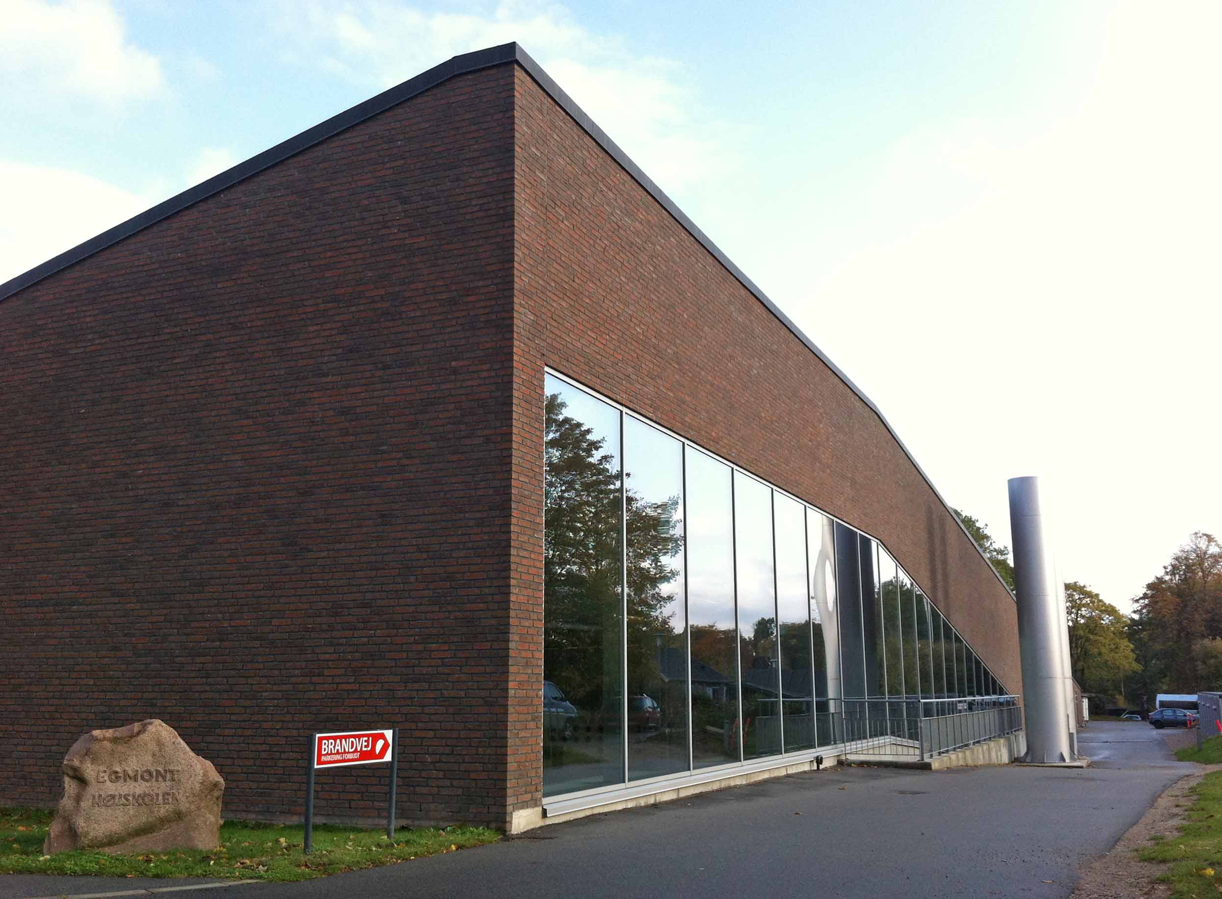 Egmont Højskolen i Hov, set fra Lærkevej